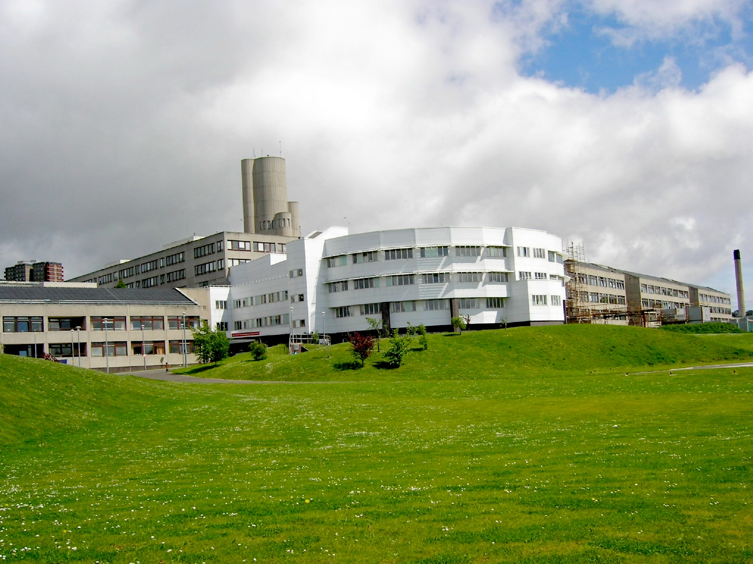 Ninewells Hospital, Dundee